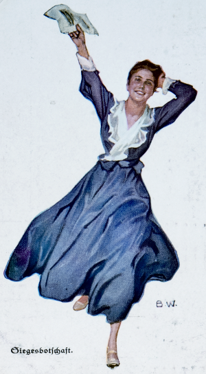 postcard